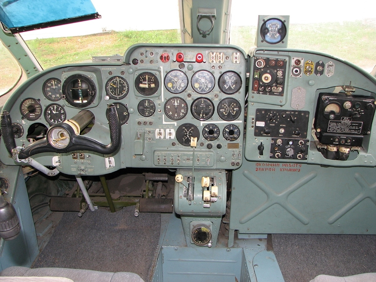 Antonov An-14 cocpit